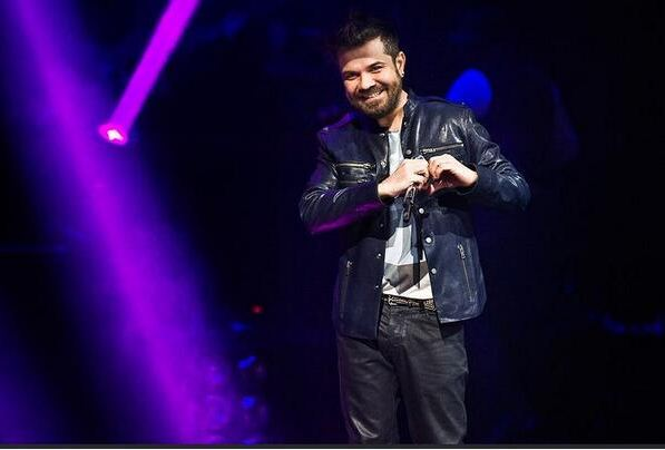 2014 İstanbul İtüfest konserinden kendi çekimimdir.